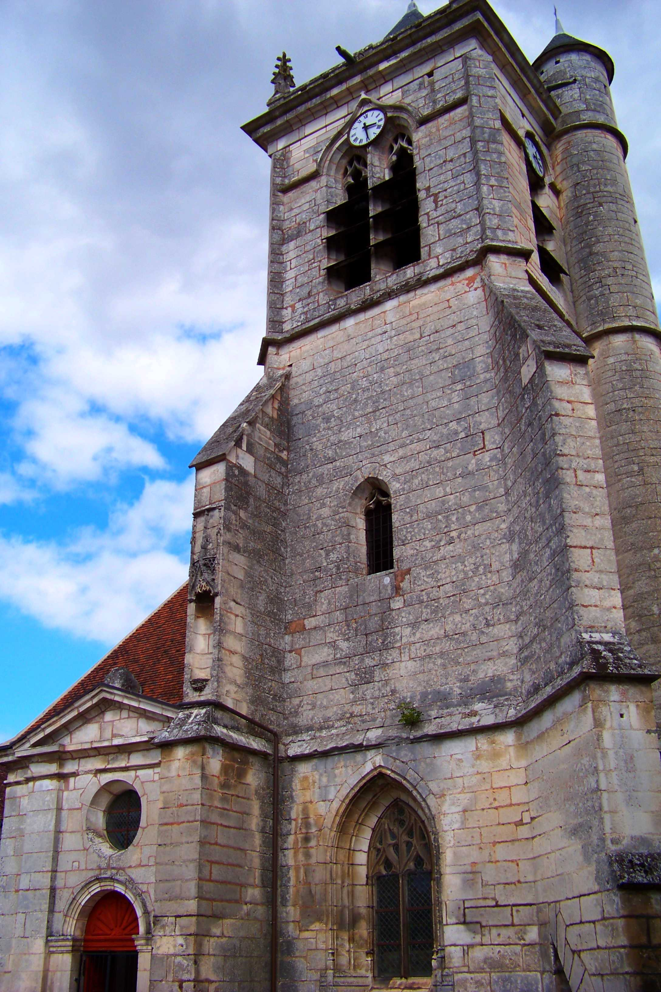 Église Saint-Laurent de Charentenay